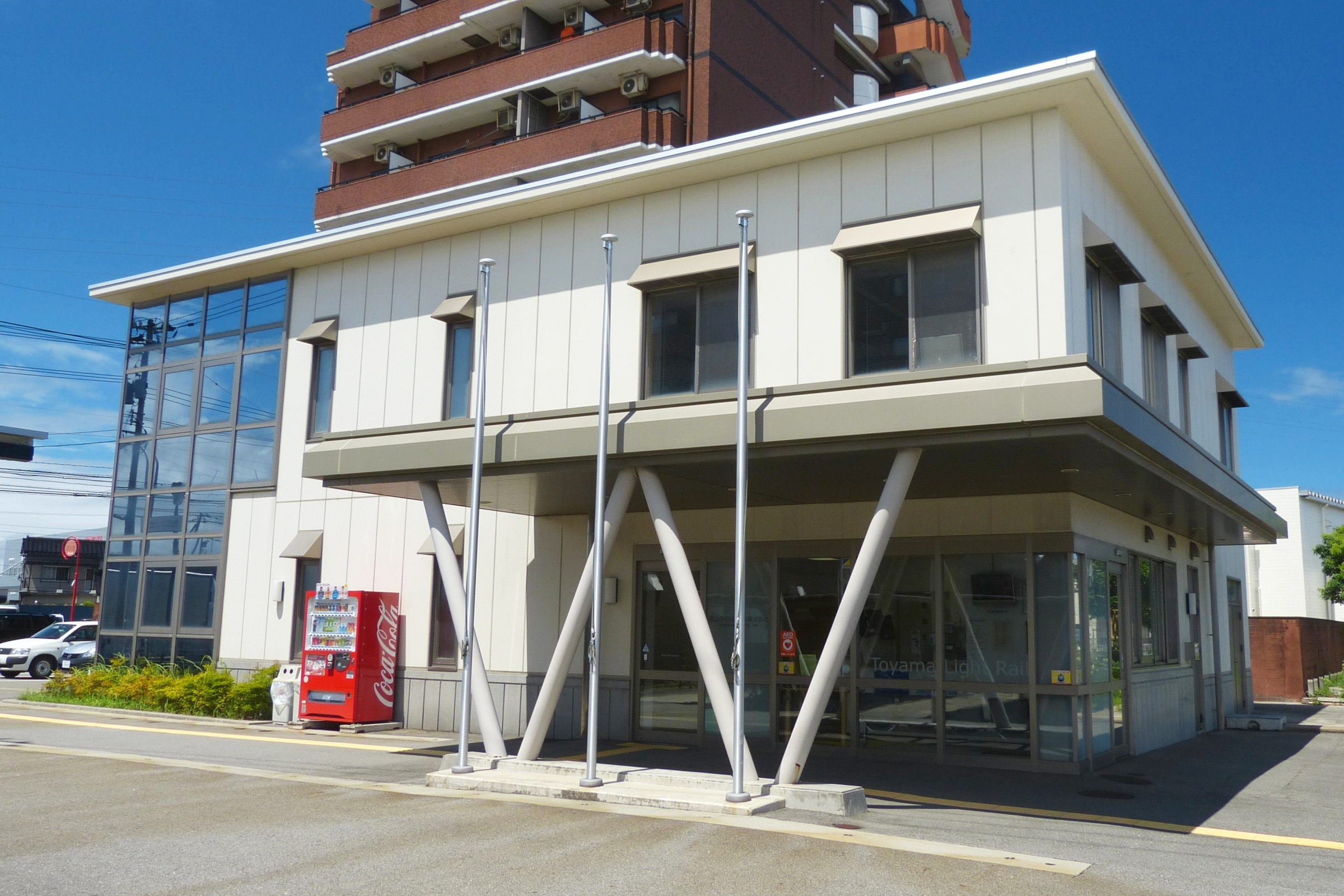 富山ライトレール本社。城川原駅待合室、定期券やグッズ等の販売所を兼ねている。